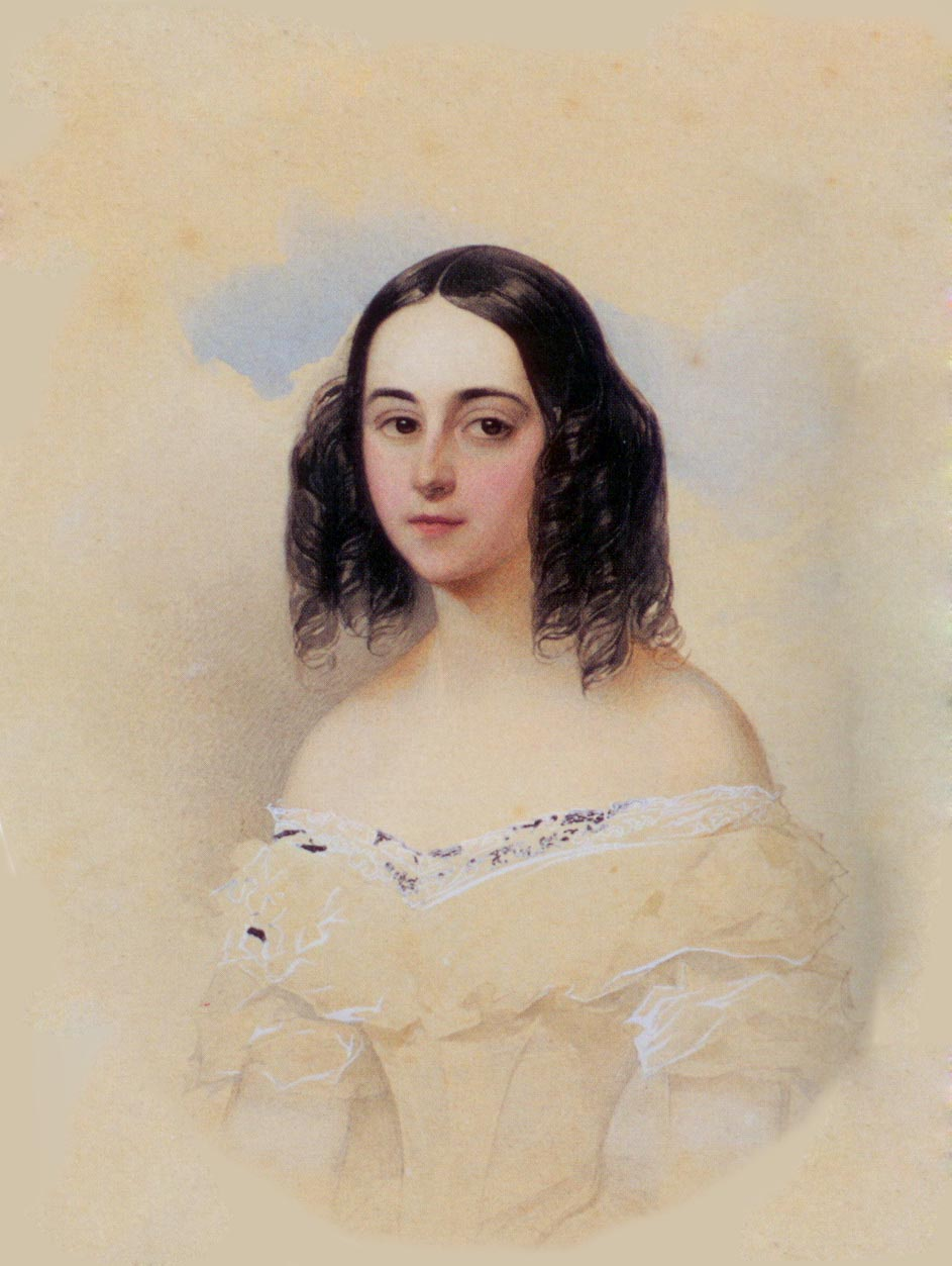 Софья Константиновна Булгакова (1818-1902), была замужем за графом Б. А. Перовским (1815—1881).